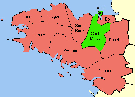 Mappa delle diocsi della Bretagna nell'alto medioevo con evidenza a quella di Saint Malo e alla sua capitale, la città di Alet